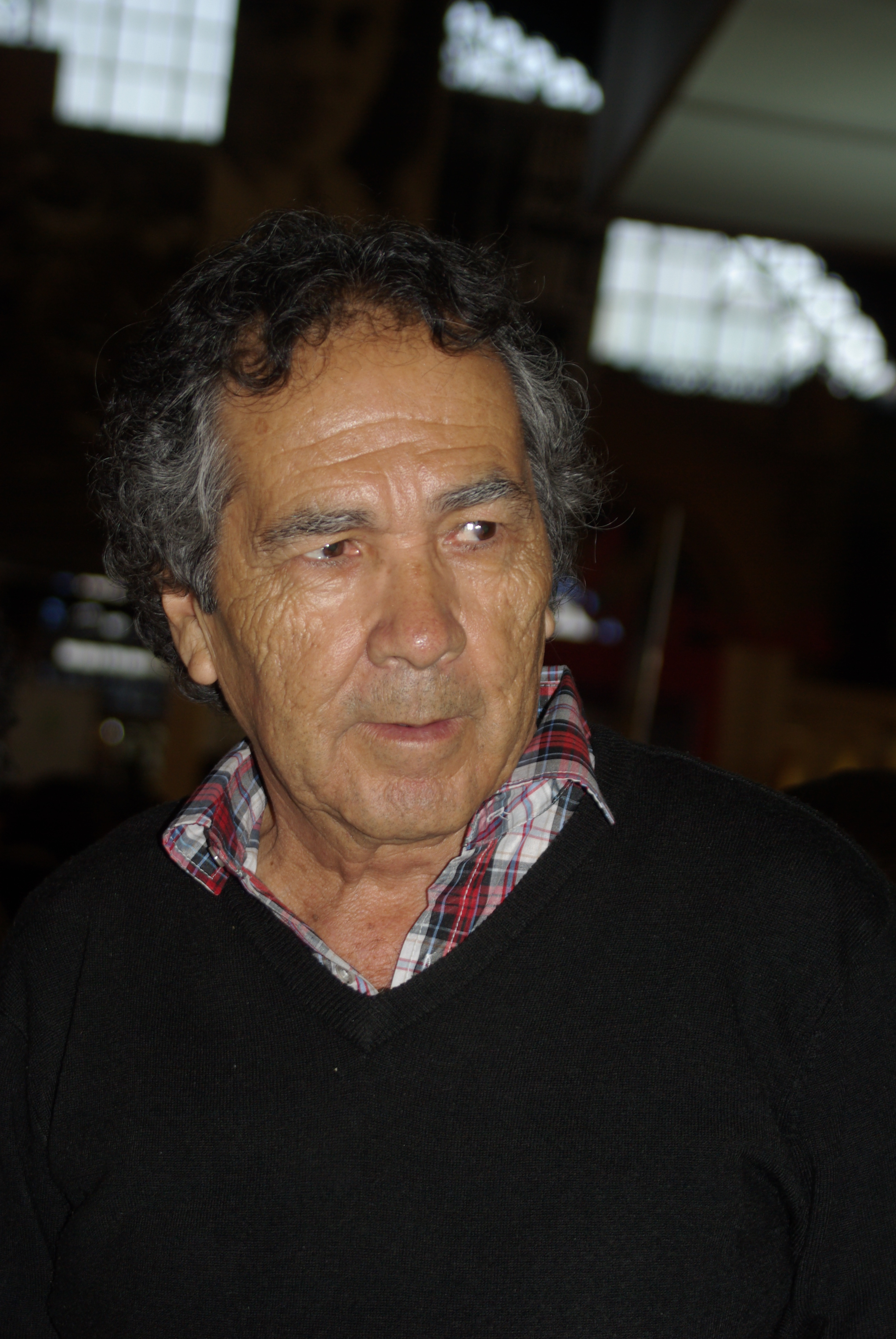 El escritor chileno Hernán Rivera Letelier en la Feria Internacional del Libro de Santiago 2015